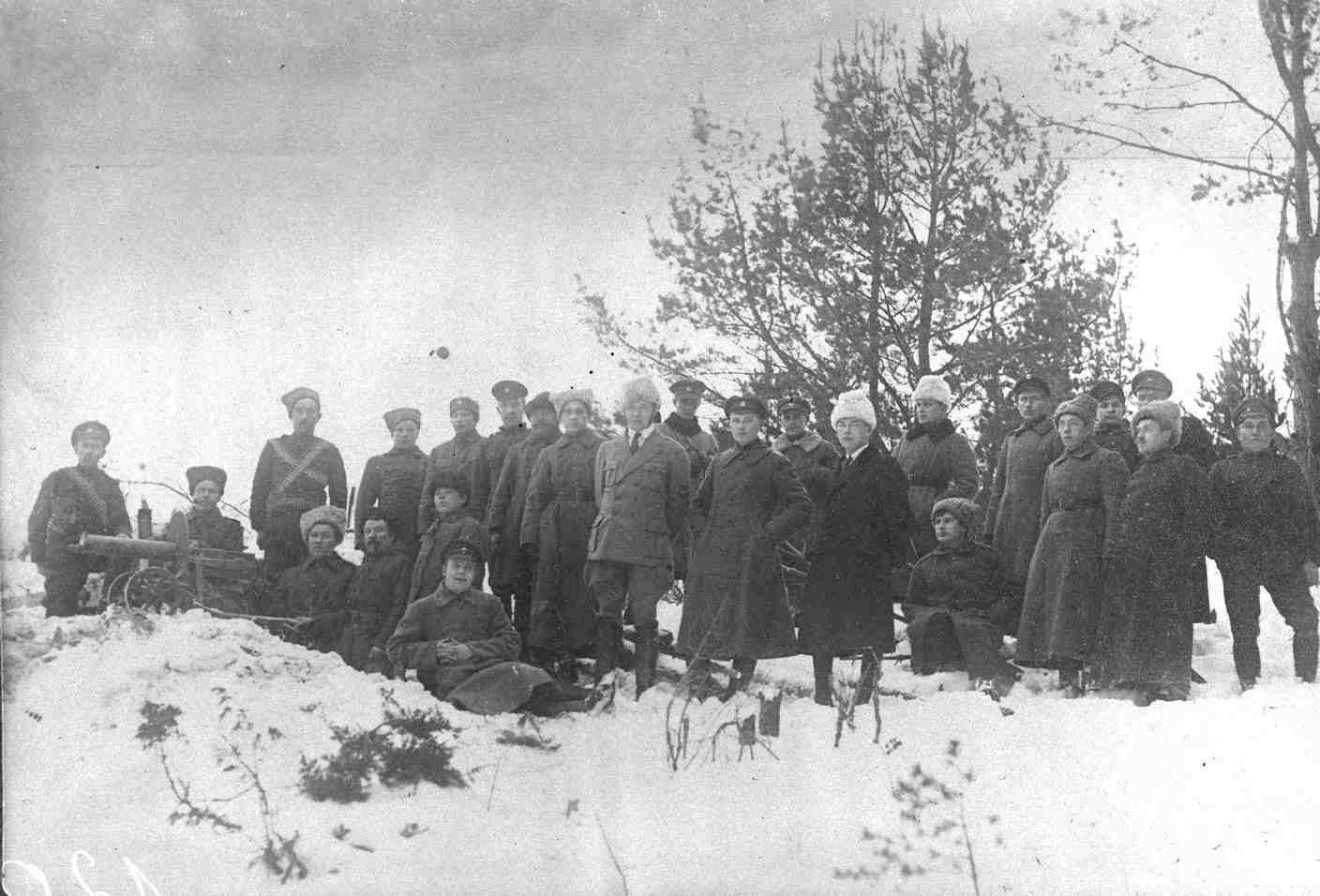 Солдаты и офицеры Западно-Ингерманландского полка.